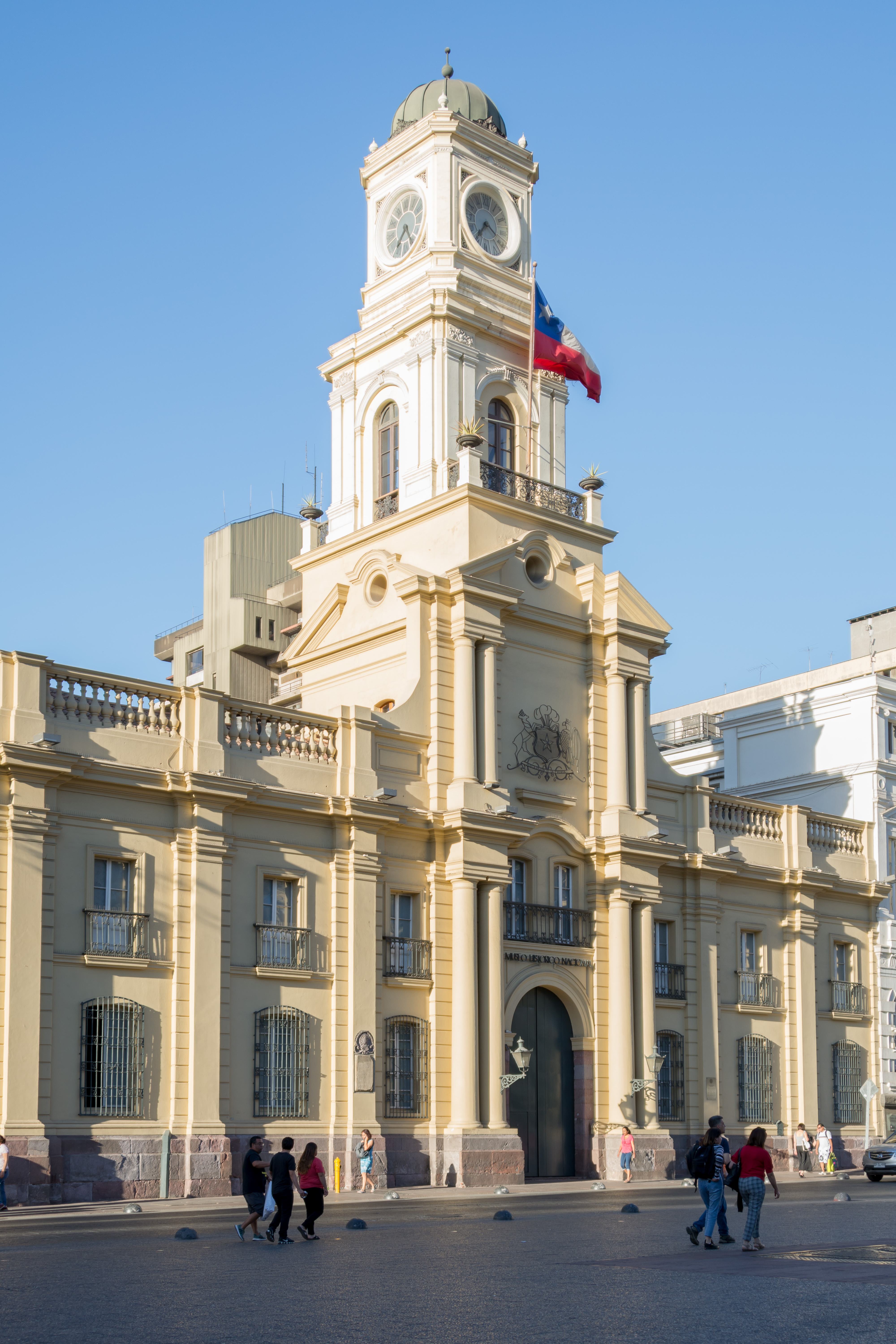 Palacio de la Real Audiencia, Santiago, Región Metropolitana de Santiago, Chile